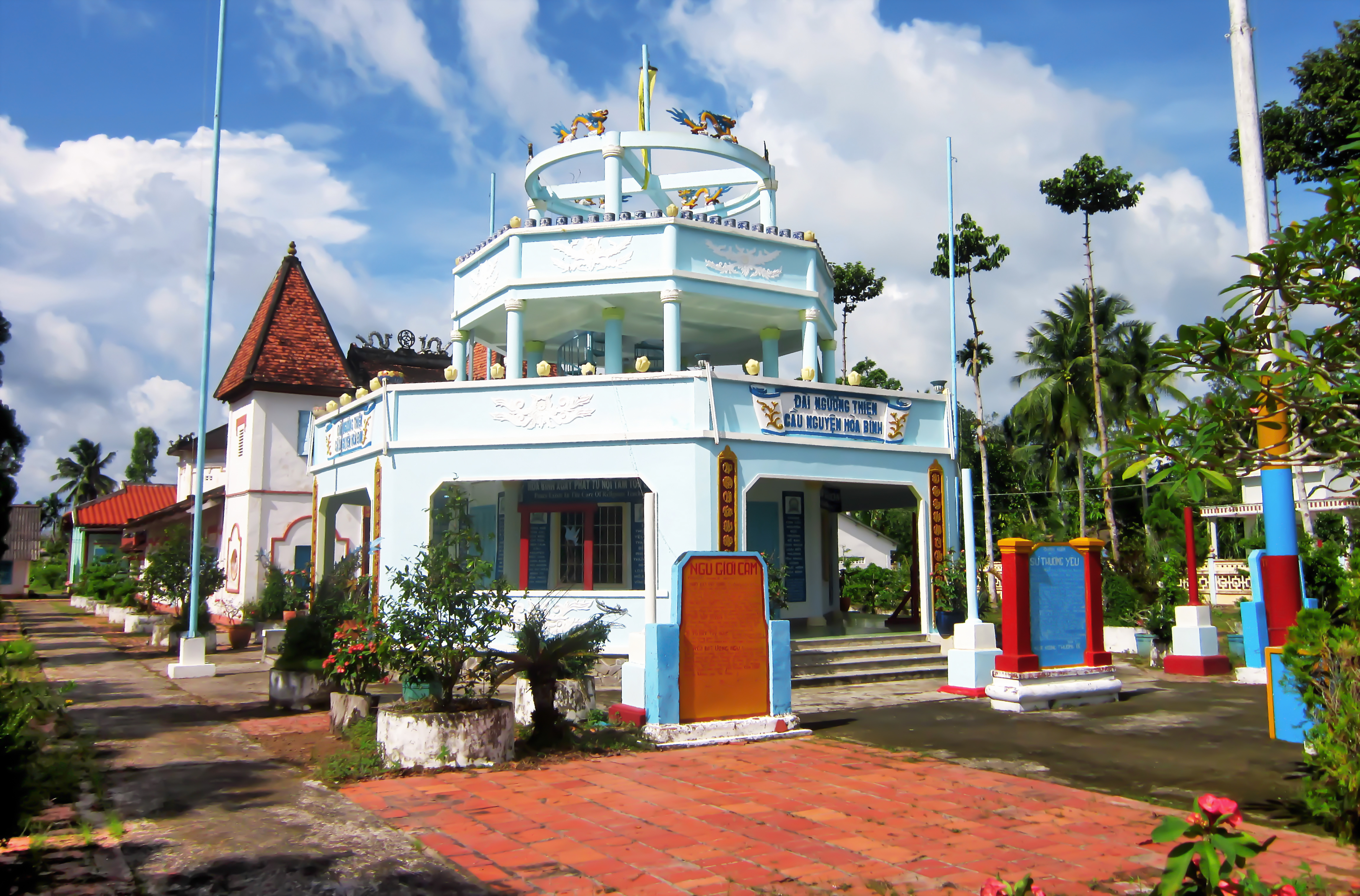 Thánh Tịnh Ngọc Sơn Quang ở xã Tân An Hội, huyện Cái Nhum (nay thuộc huyện Mang Thít, tỉnh Vĩnh Long, Việt Nam).Đây là một thánh thất của đạo Cao Đài theo phái Tiên Thiên.